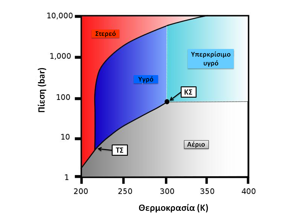 CO2-Διάγραμμα φάσεων